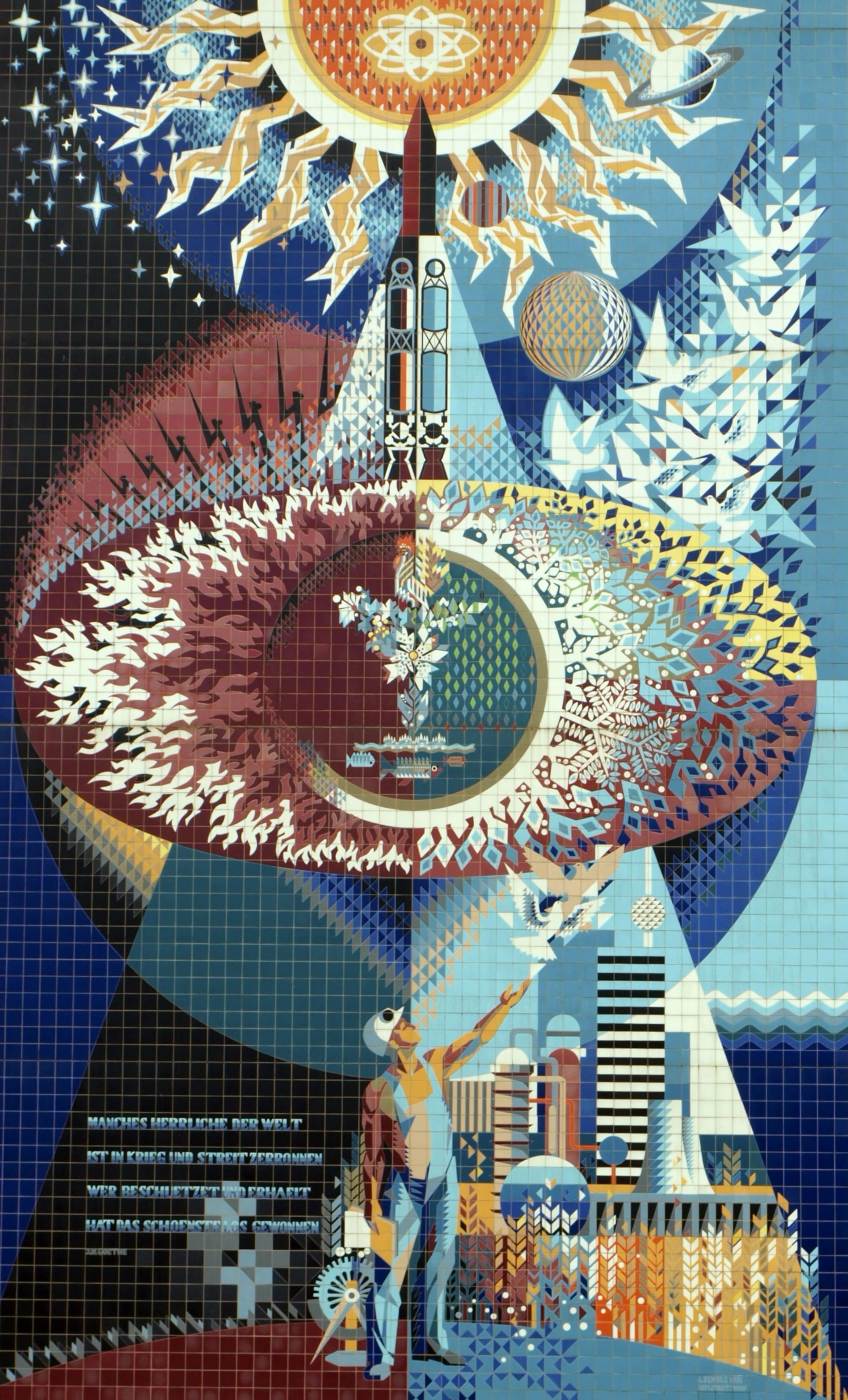 Giebelwandbild "Manches Herrliche der Welt..." an der Oberschule III (ab 1974 Hermann-Matern Oberschule) in Boizenburg. Geschaffen 1971 und erneuert im Jahr 2000 von Diplom-Baukeramiker und Baugestalter Lothar Scholz. Glasurmalerei auf Steinzeugfliesen; Größe: 104 m².